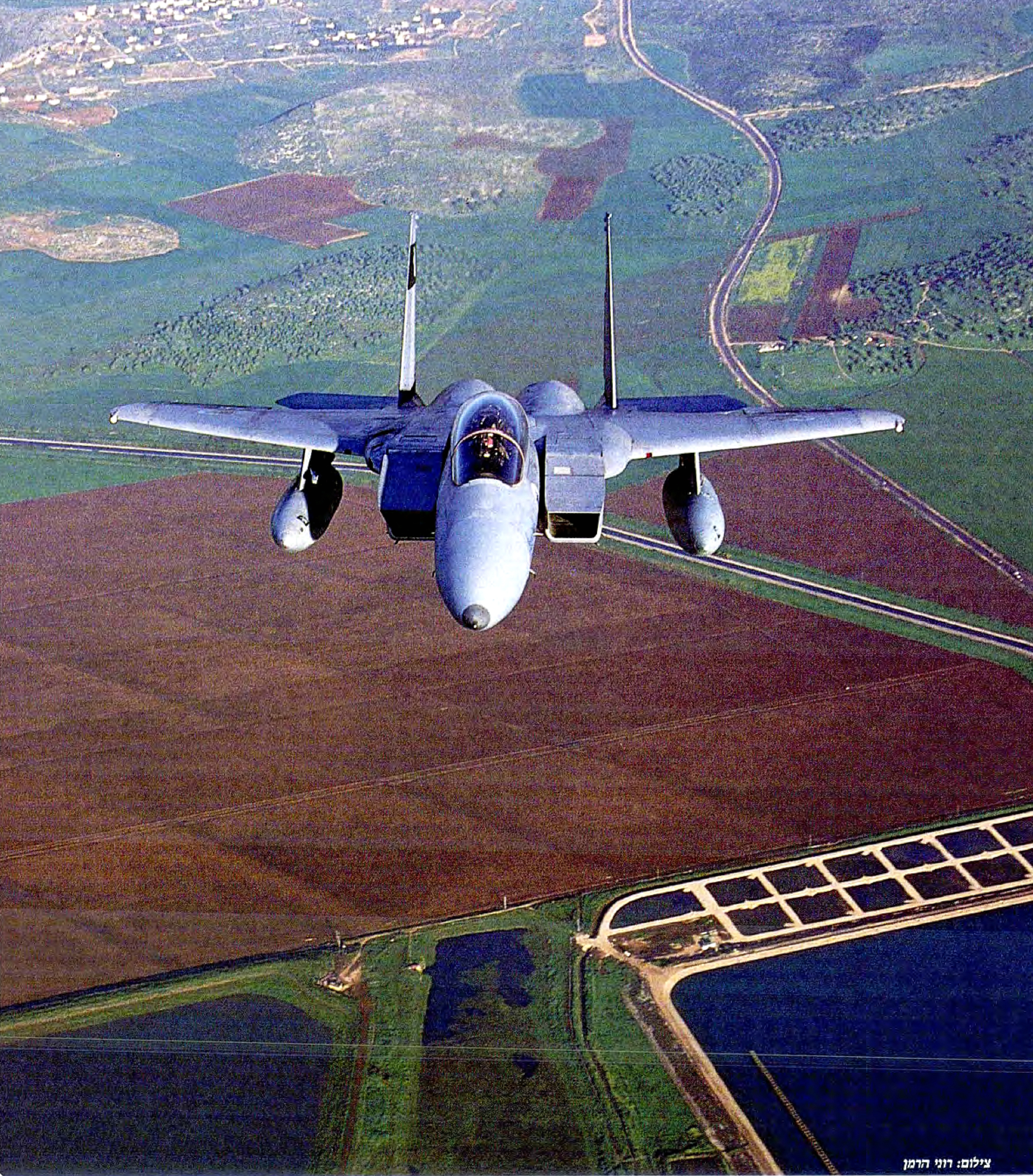 מרכז ניסויי טיסה.